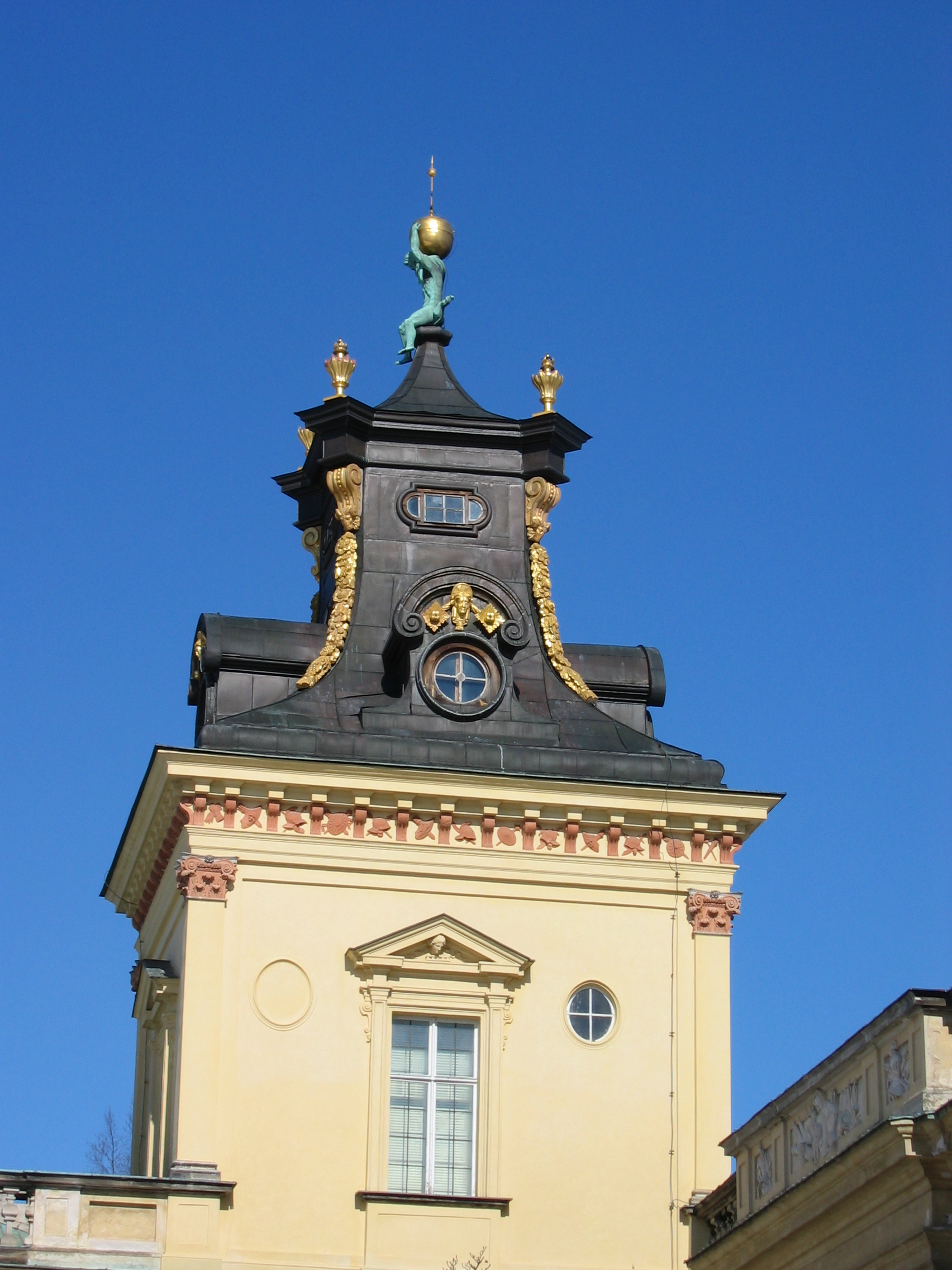 author Maciej Szczepańczyk-User:Mathiasrex